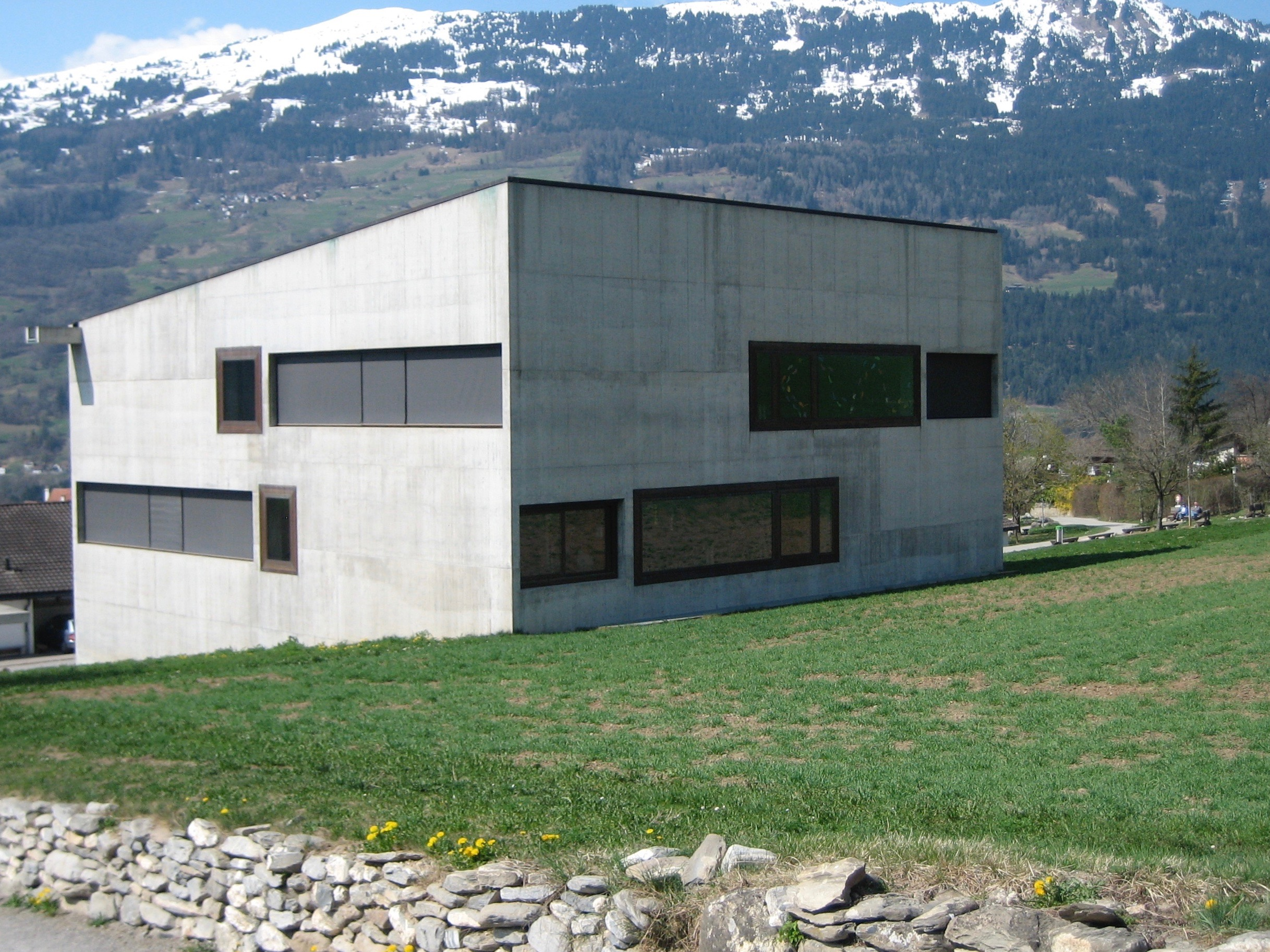 Oberstufenschulhaus in Paspels von Valerio Olgiati